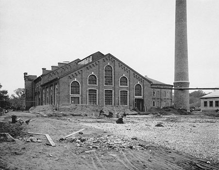 171. Газовый заводъ. Заводъ водяного газа. (Москва)